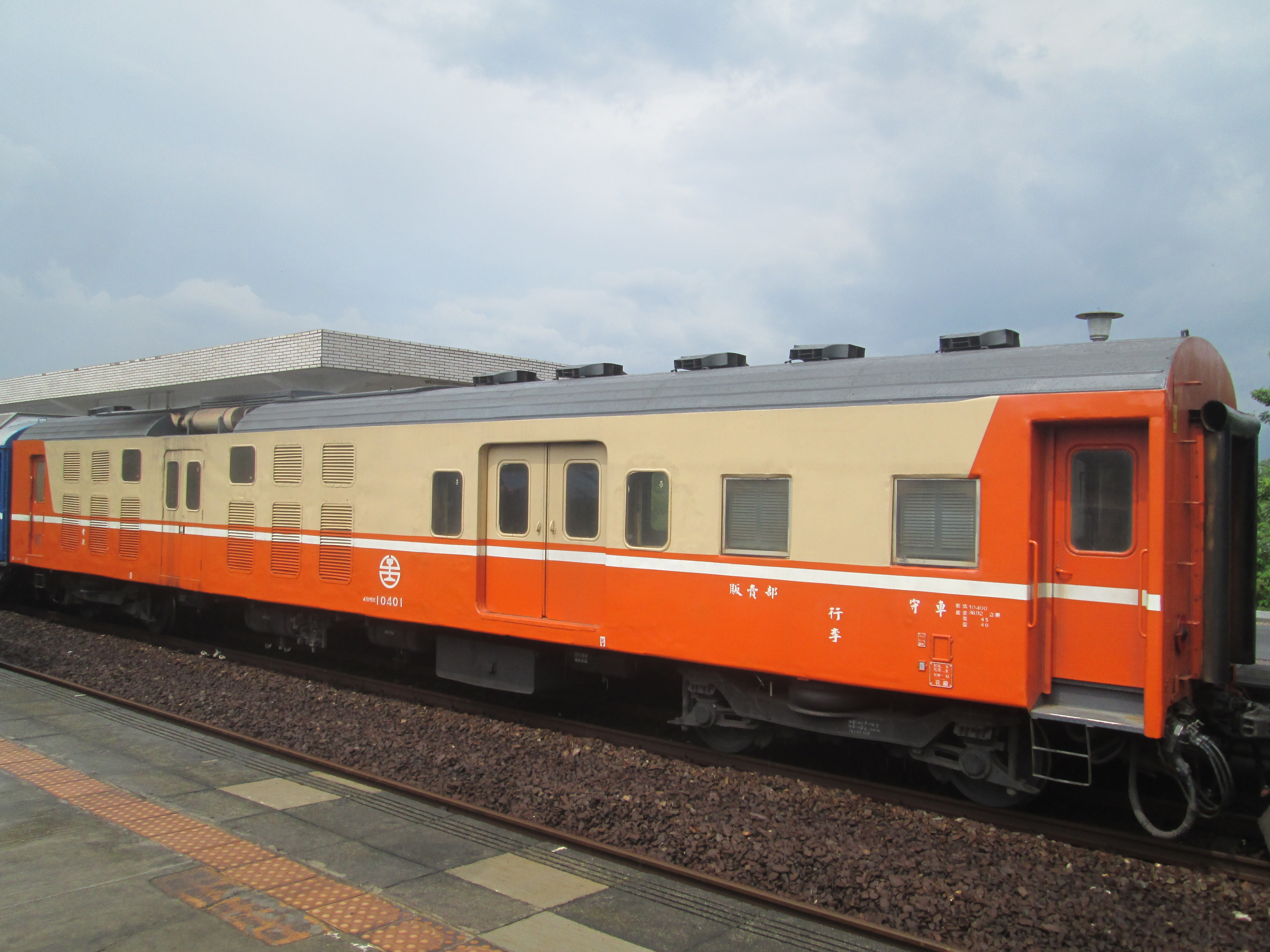 臺灣鐵路管理局電源行李車PBK10401。